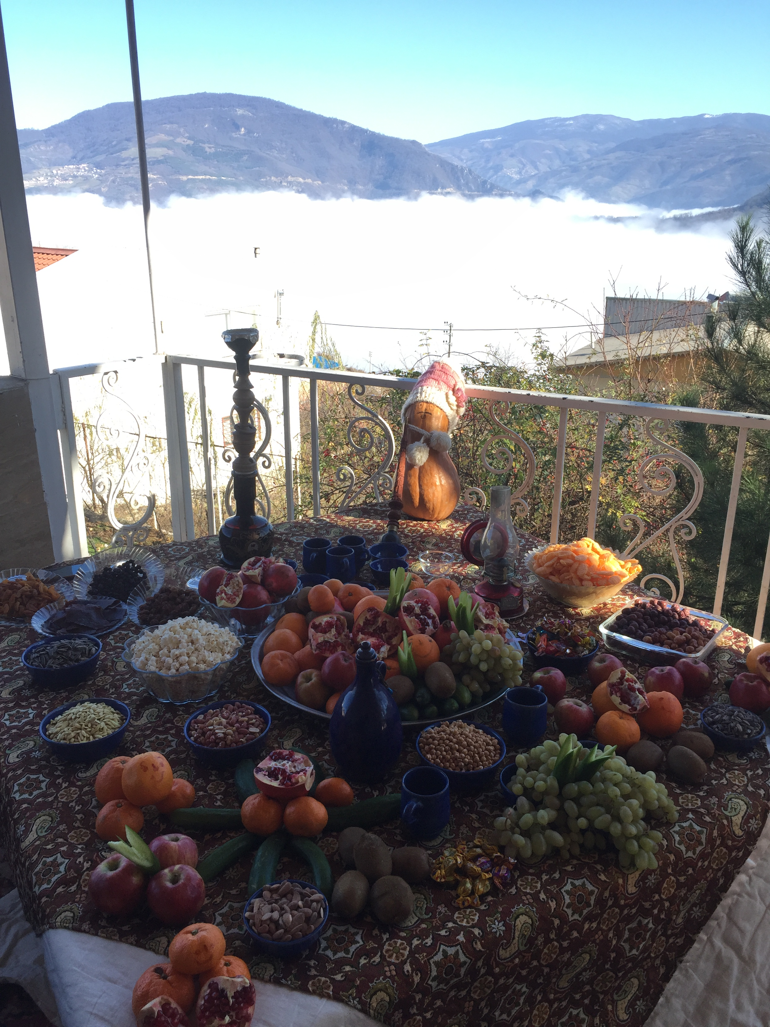 منظره زیبای پاقلعه11